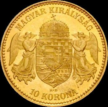 10 korona (Hungary) 1900 - reverse